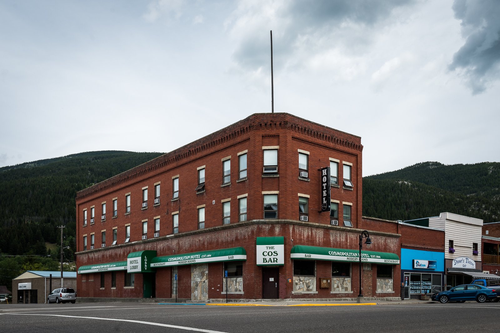 2016-07-02 Blairmore